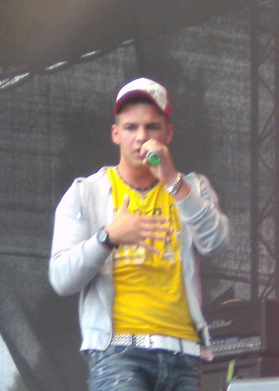 Pietro Lombardi beim RPR1 Kindertag in Bad Kreuznach